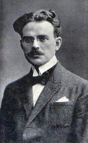 Octave Léry en 1924.